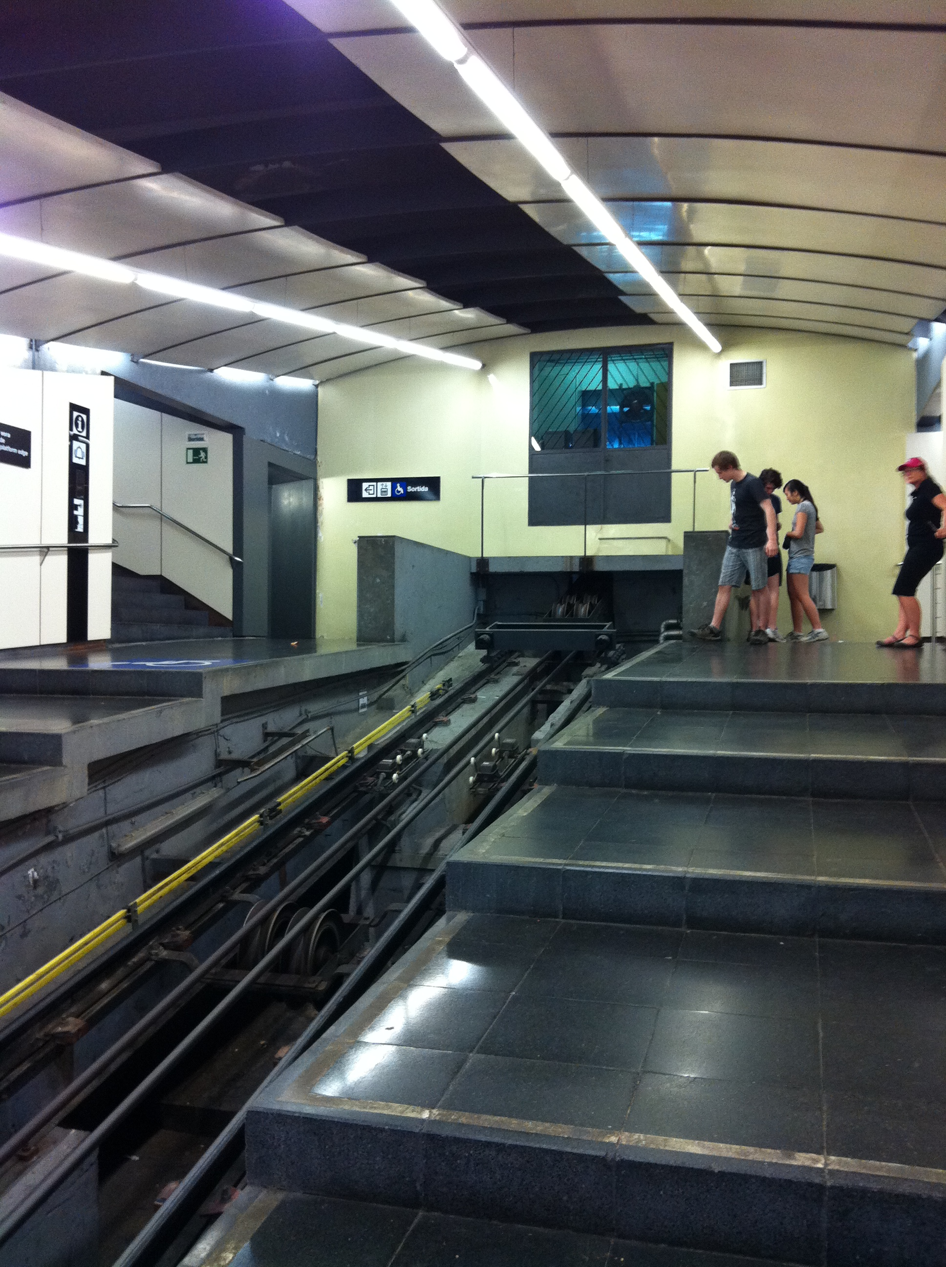 Funicular de Montjuïc Funicular de Montjuïc Miramar station